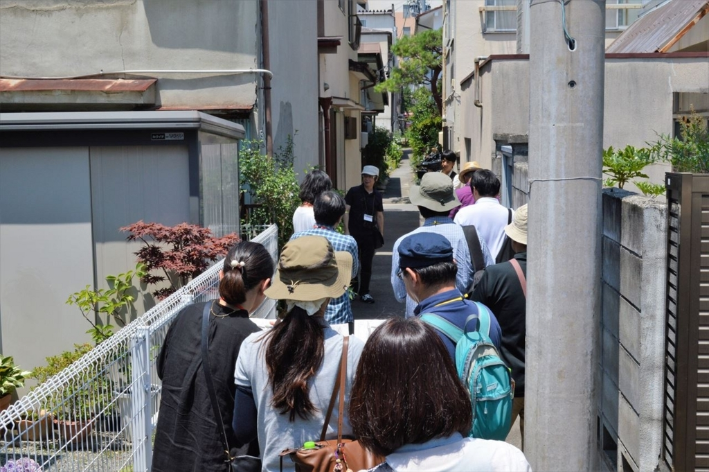 2017年7月8日に開催されたWikipedia Town in 飯田[1]のまちあるふ風景。